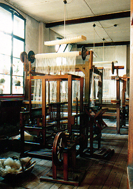 Der Websaal in der Handweberei Geltow Aktives Museum Henni Jaensch-Zeymer